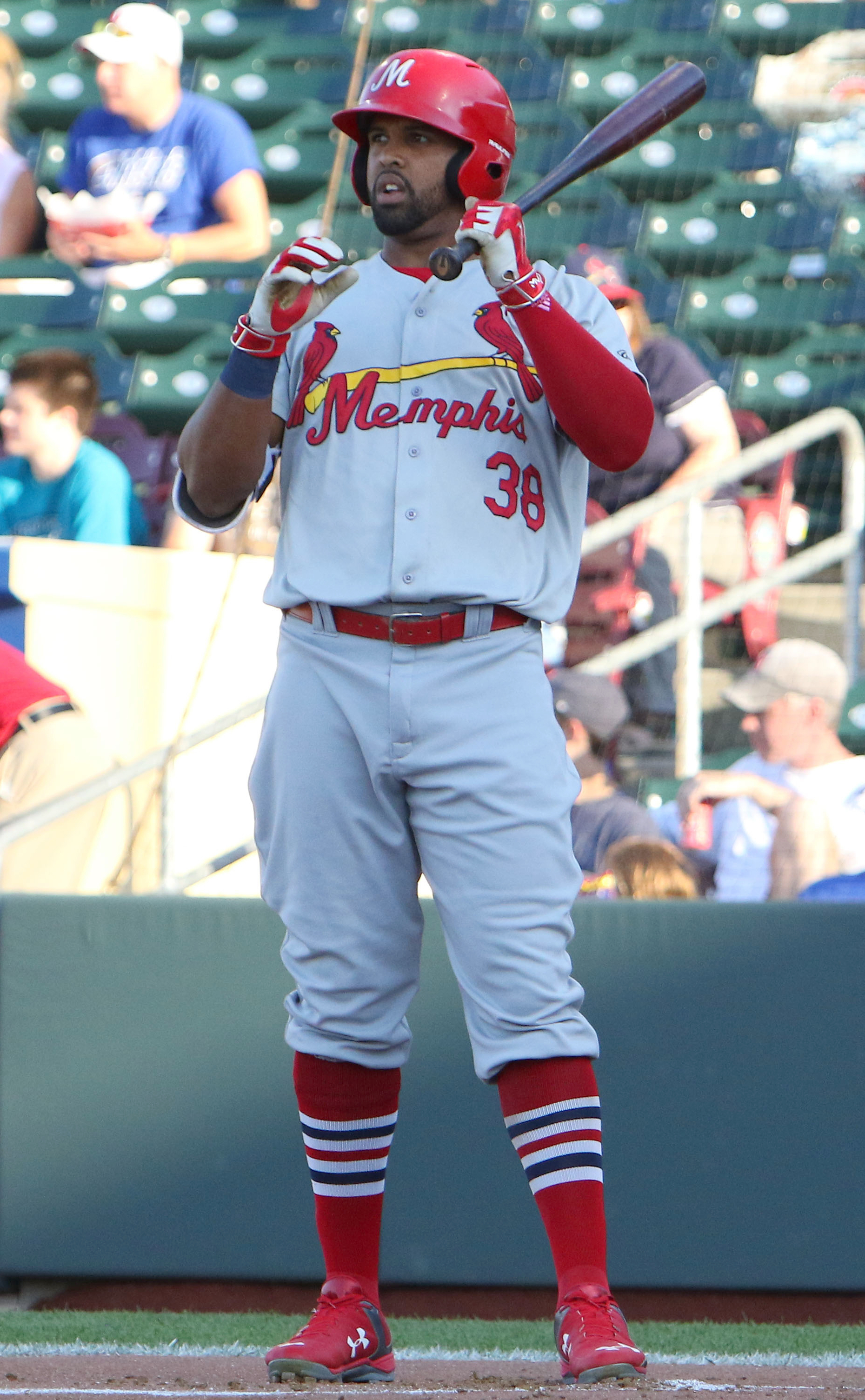 Carlos Peguero